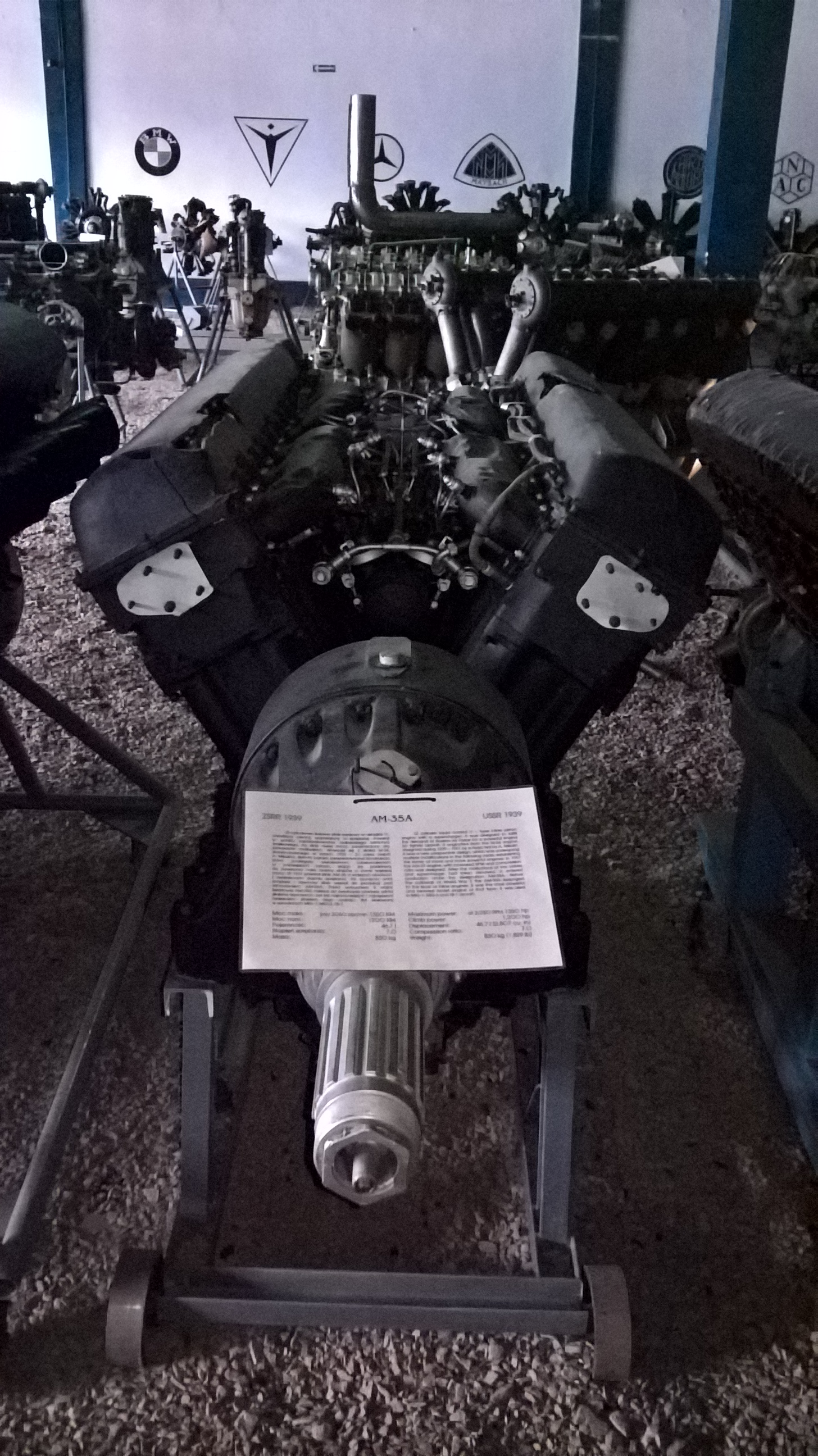 Radziecki 12-cylindrowy silnik widlasty AM-35A z 1939 r. ze zbiorów Muzeum Lotnictwa Polskiego w Krakowie.